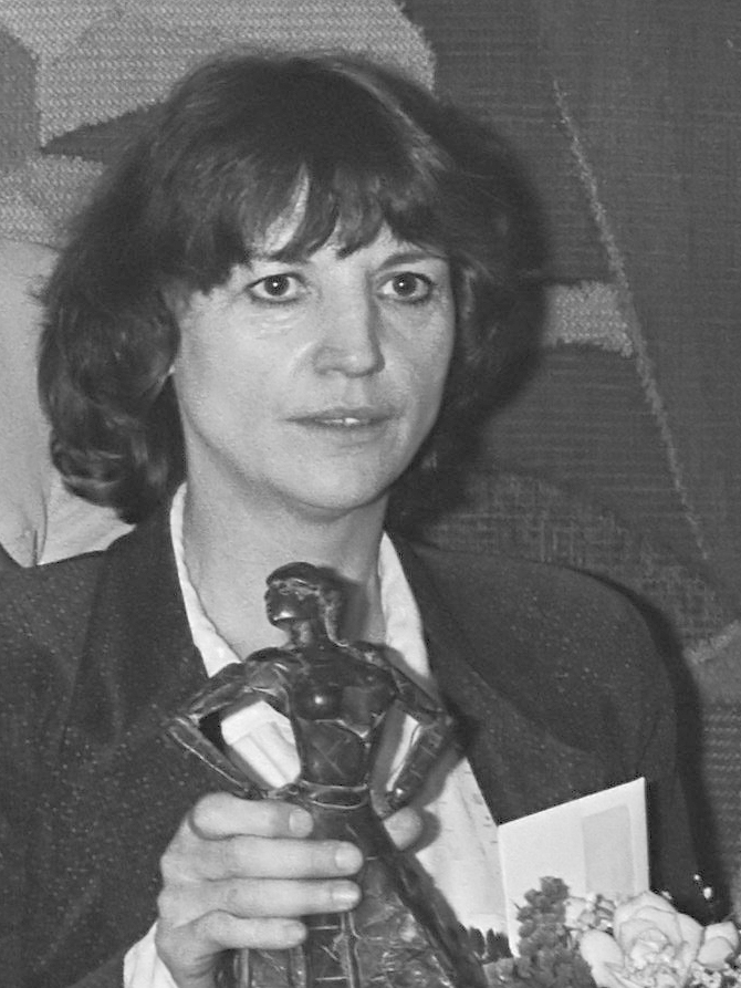 Toneelprijzen 1980 uitgereikt door ministers Gardeniers (CRM) in Leiden temidden van de prijswinnaars, vlnr. v.d. Berg , Siem Vroom, Josée Ruiter, Til Gardeniers, Hans Croiset en Kitty Courbois. Courbois ontvangt de Colombina. 20 mei 1980